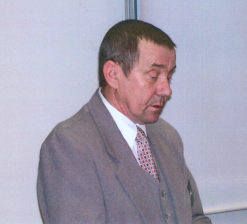 Svatopluk Pastyřík